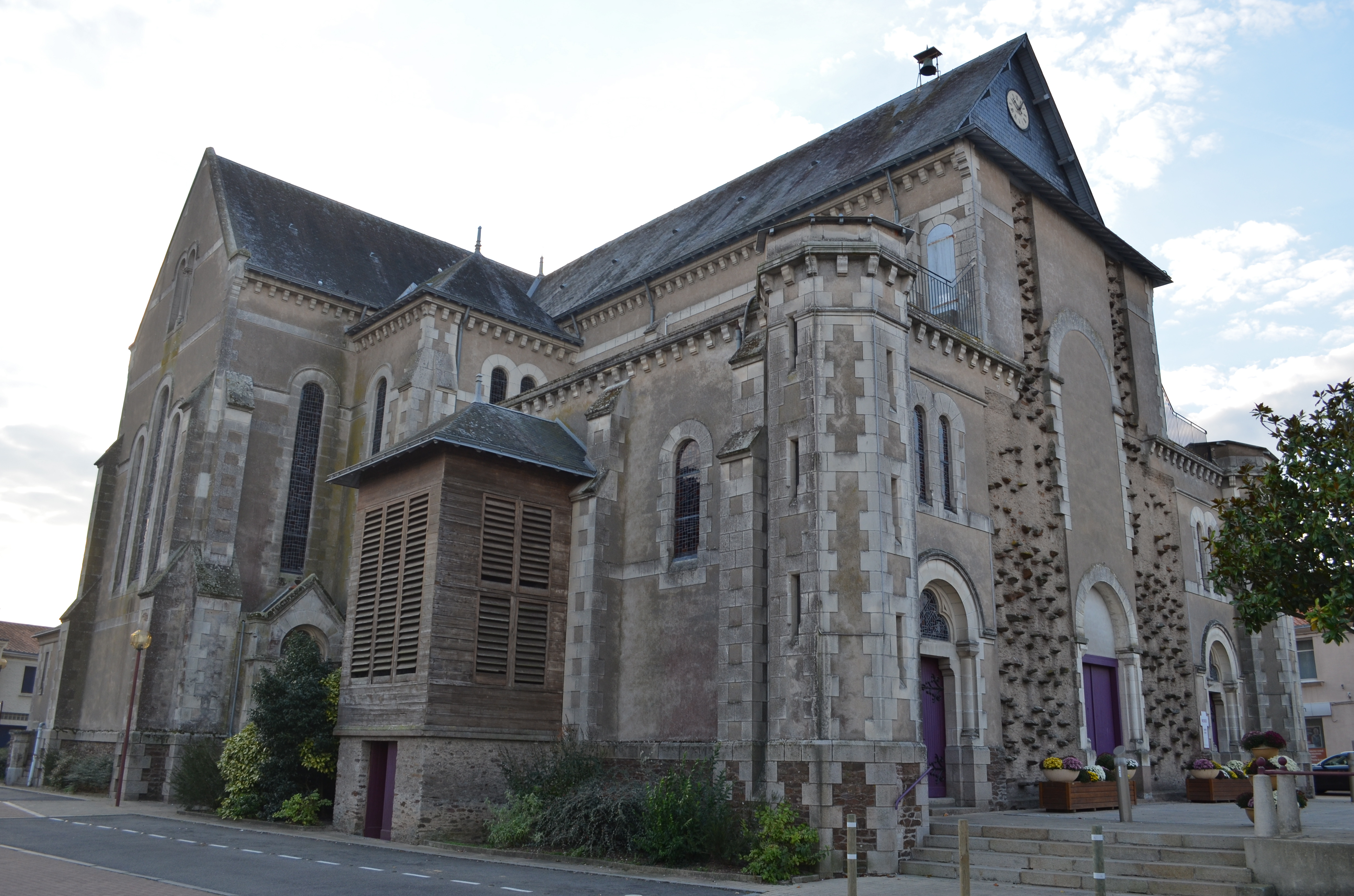 Eglise Saint-Julien - Saint-Julien-de-Concelles (Loire-Atlantique)